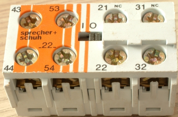 Hilfskontaktblock Typ aufschnappbar, auf einem Schützen mit zwei Schliessern sowie zwei Öffnern, Firma „Sprecher+Schuh“